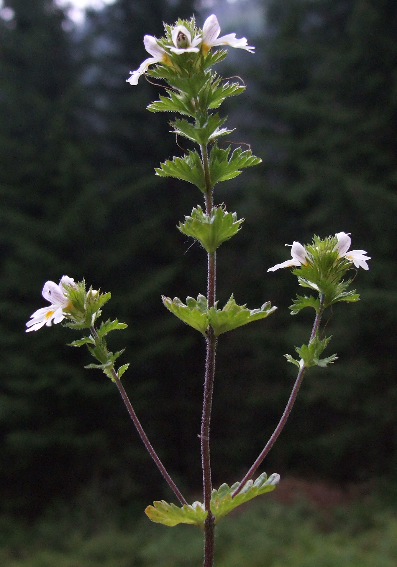 Euphrasia tatrae (pl. świetlik tatrzański), habitat: Dolina Rohacka, West Tatra Mountains